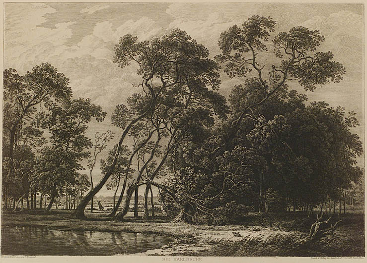 Landscape near Karlsruhe